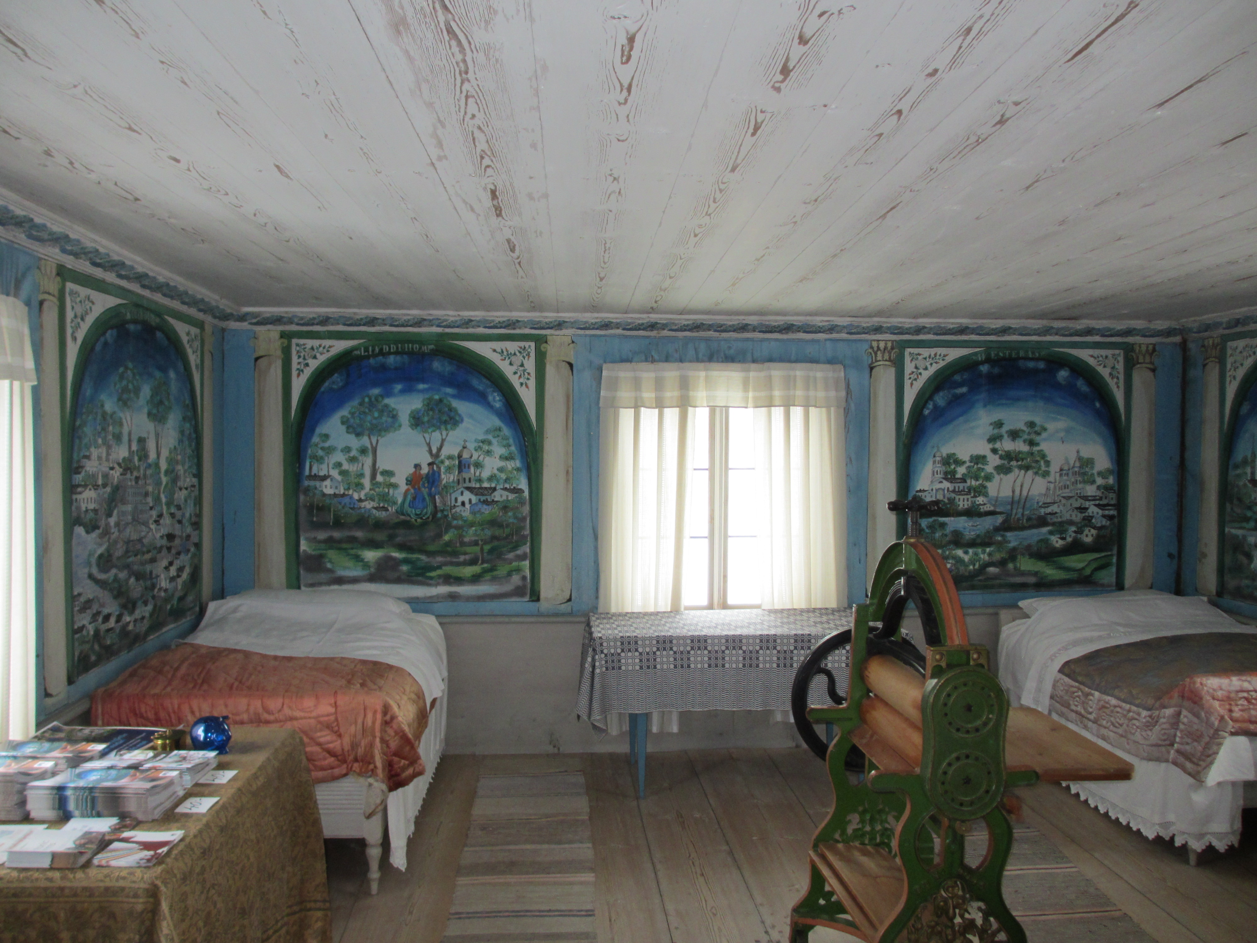 Pallars sängstuga där gäster övernattade